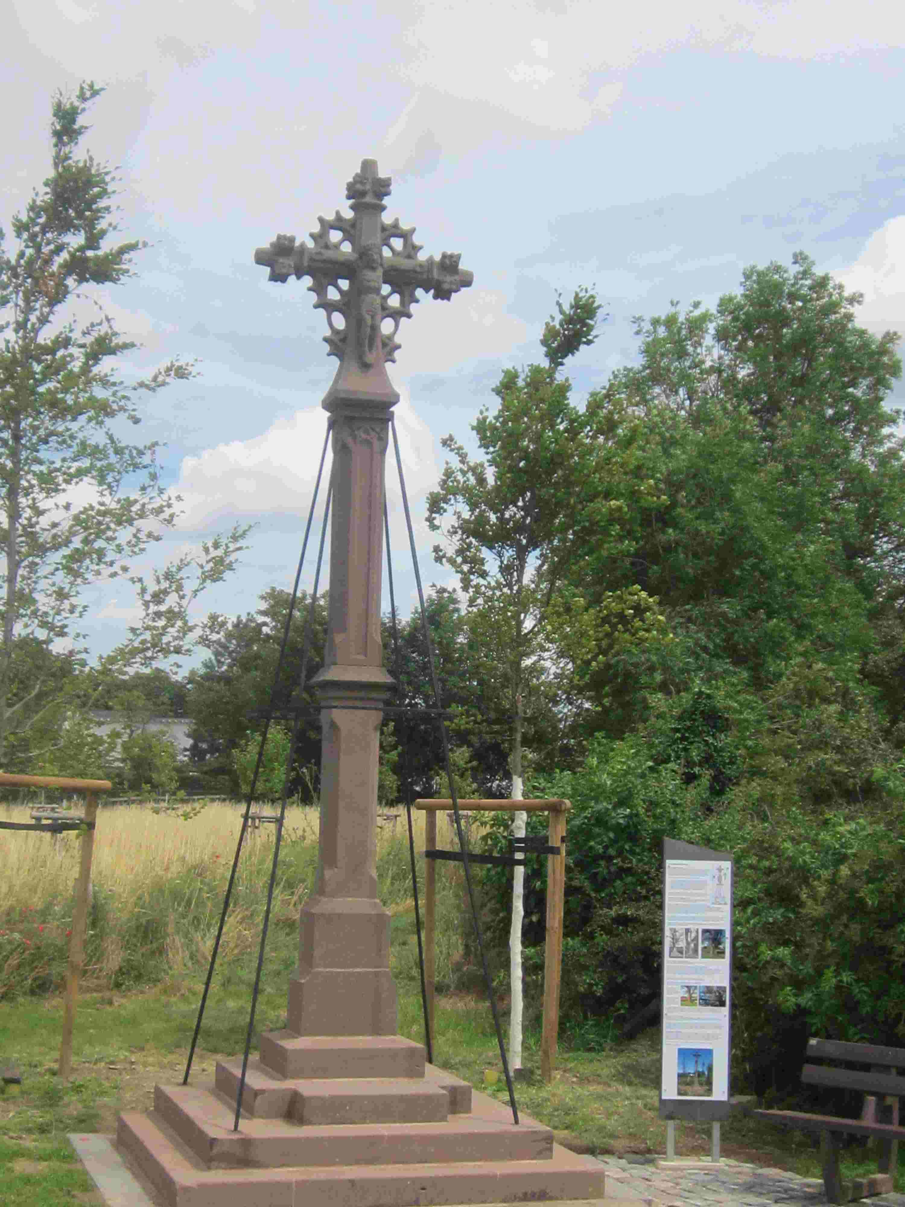 Das umgestaltete Umfeld um das Schwarze Kreuz in Frauwüllesheim